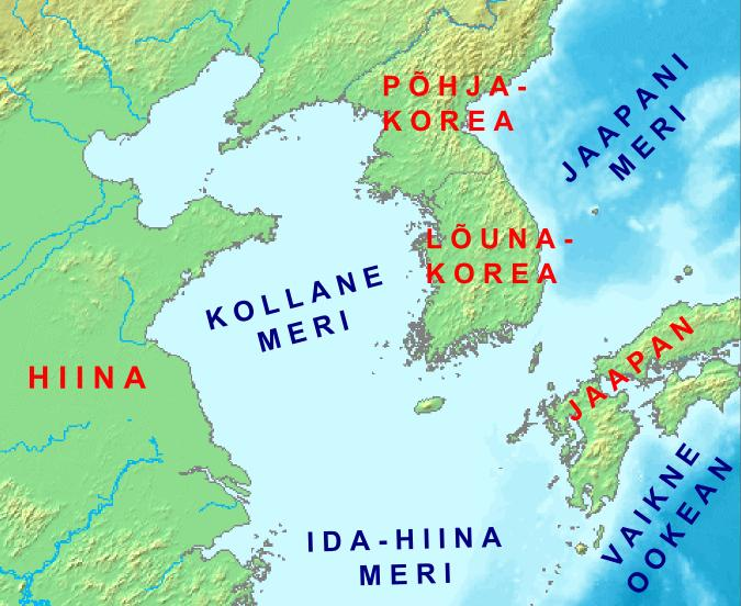 Kollane meri. Kaart on tehtud DEMIS Mapserveri kaardi alusel ja pärast oli lisatud kohanimed.